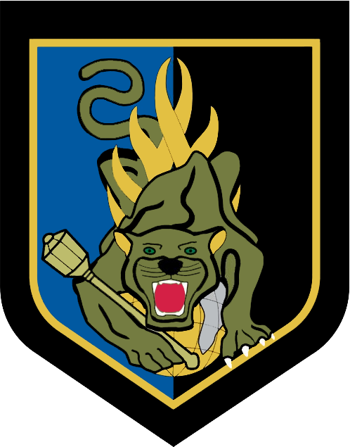 Écusson de bras gauche du Centre national d'entraînement des forces de gendarmerie